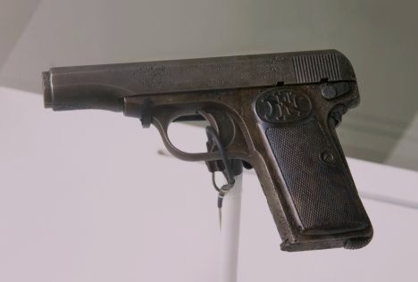 Gabrillo Princip's pistol, FN M1910